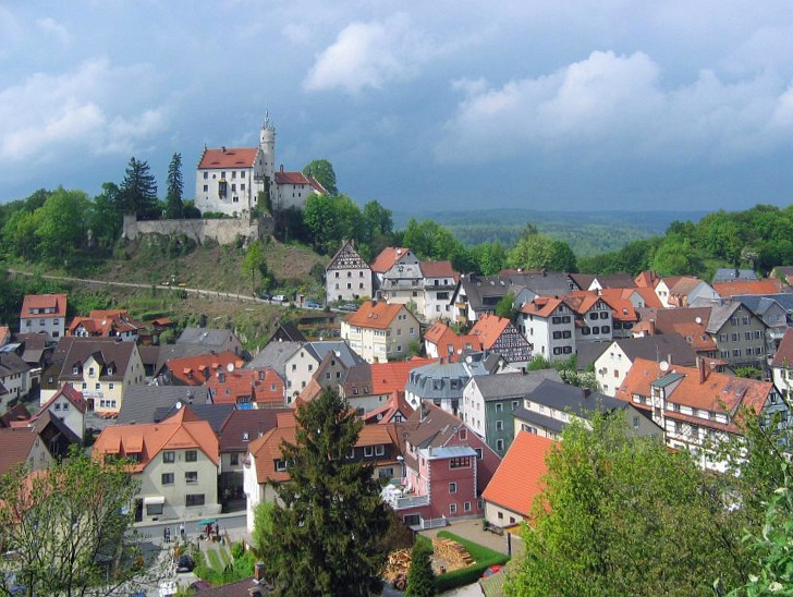 Ort und Burg Gößweinstein, Landkreis Forchheim, Bayern, Deutschland.